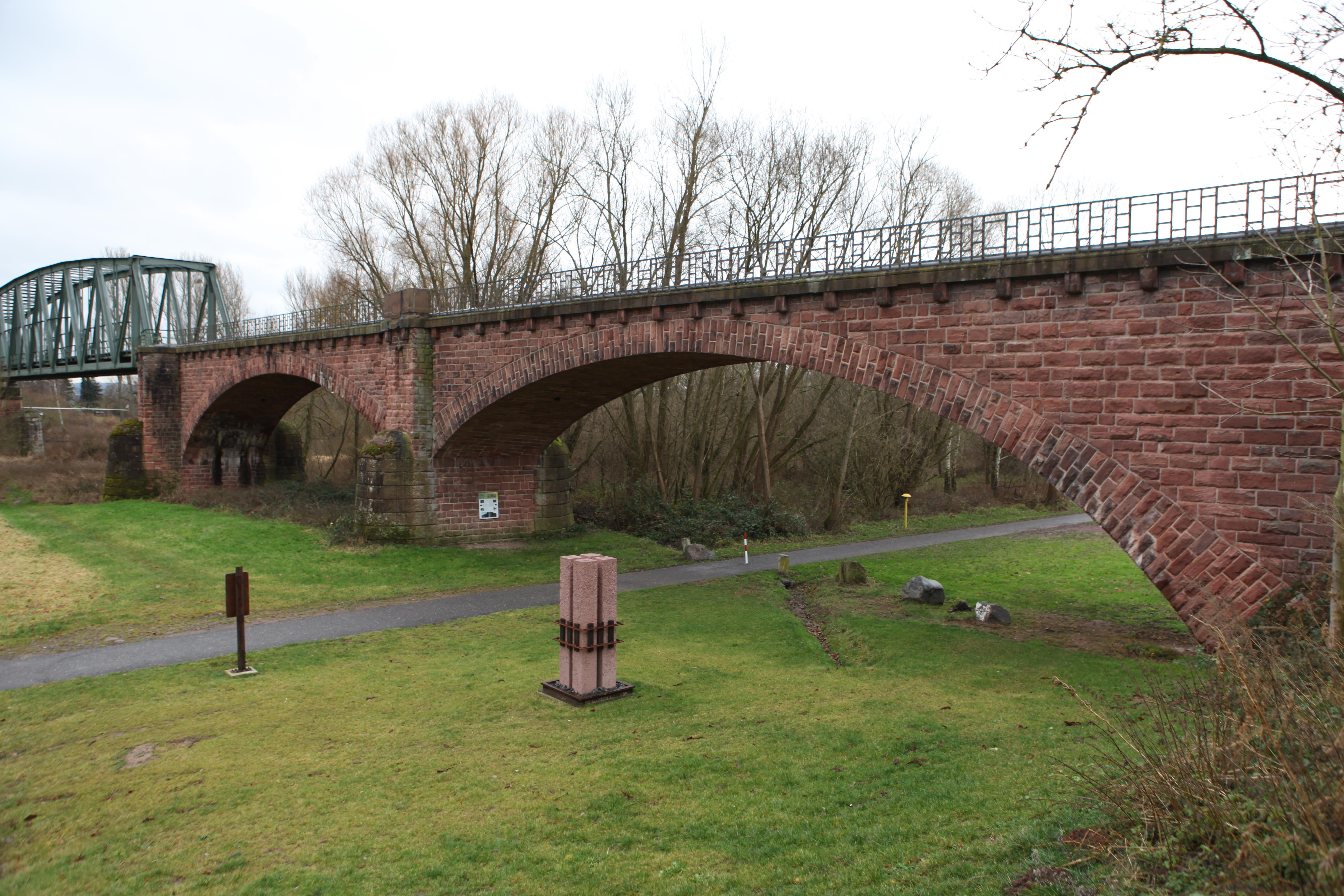 Mainbrücke Nilkheim, Aschaffenburger OT